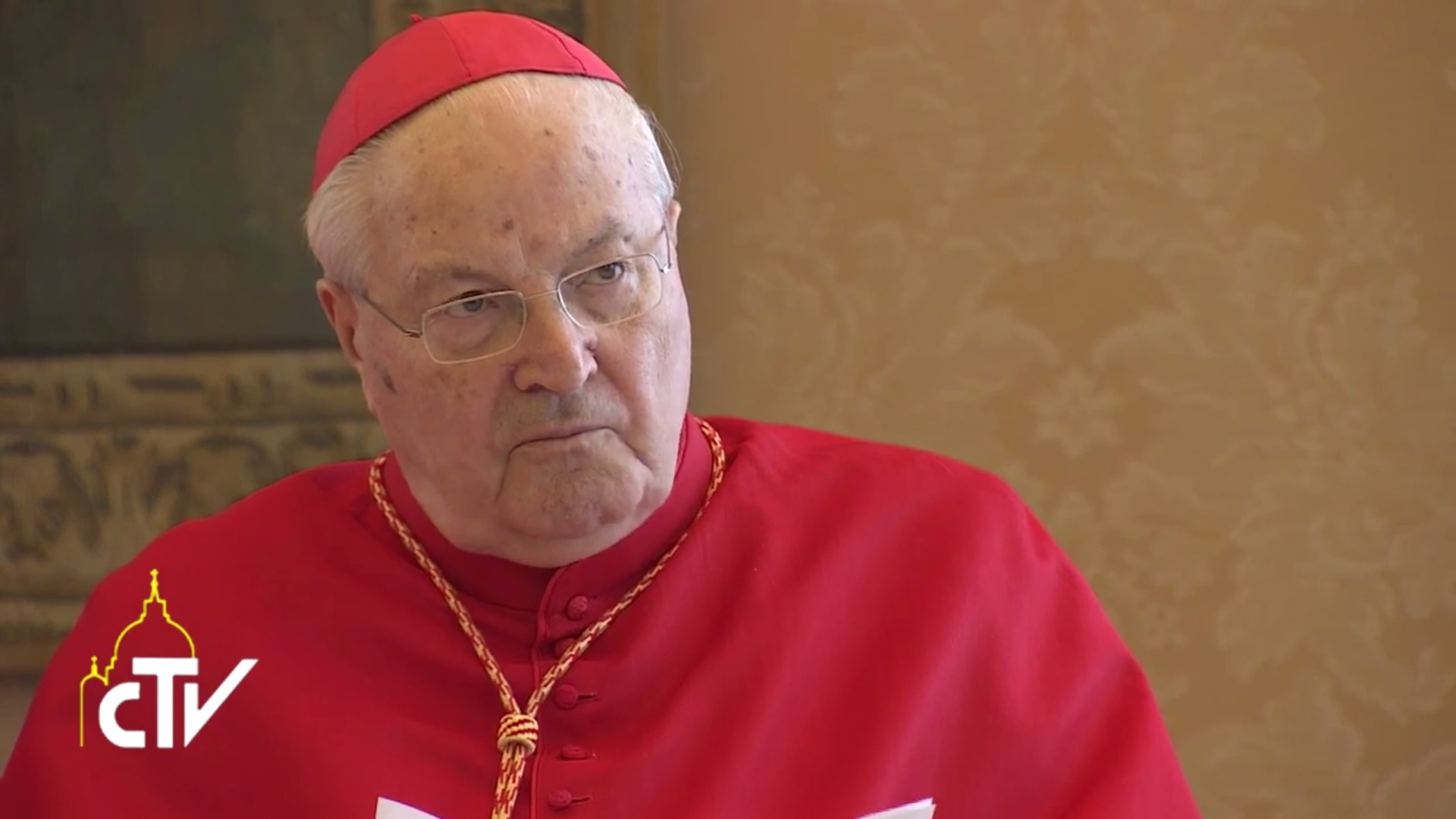 Le cardinal Angelo Sodano au cours du consistoire ordinaire public donné par le pape François le 15 mars 2016.